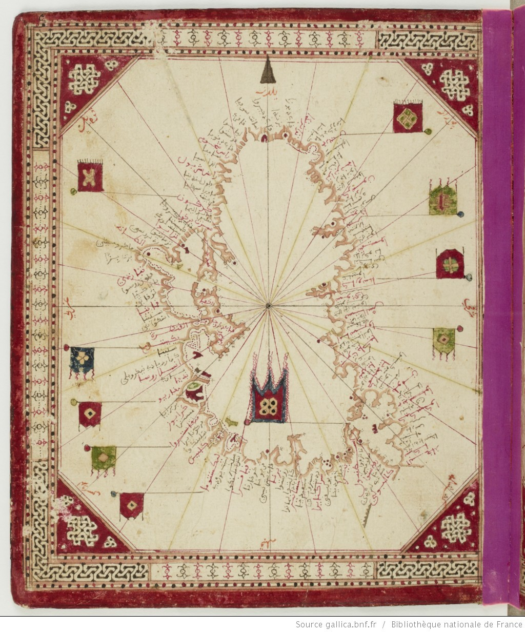 كتاب الطبلة